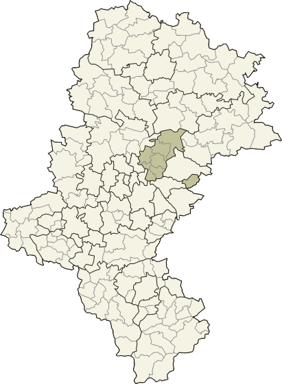 Powiat będziński w województwie śląskim